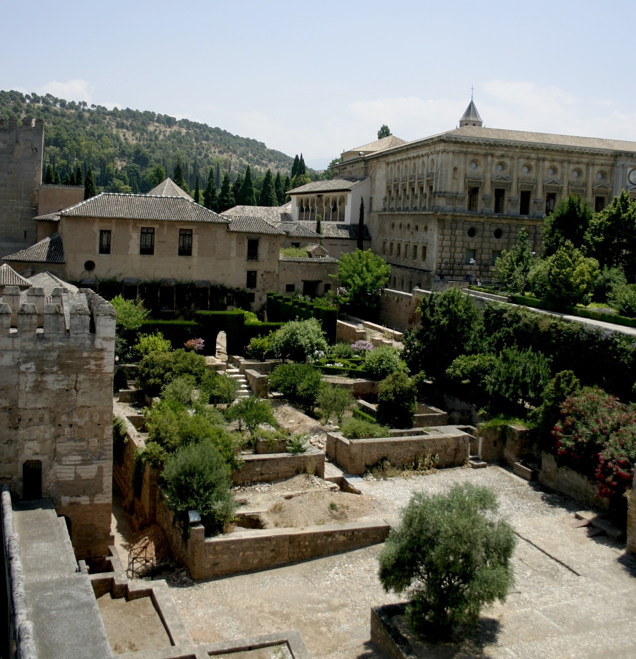 Granada, Alhambra: Generalife